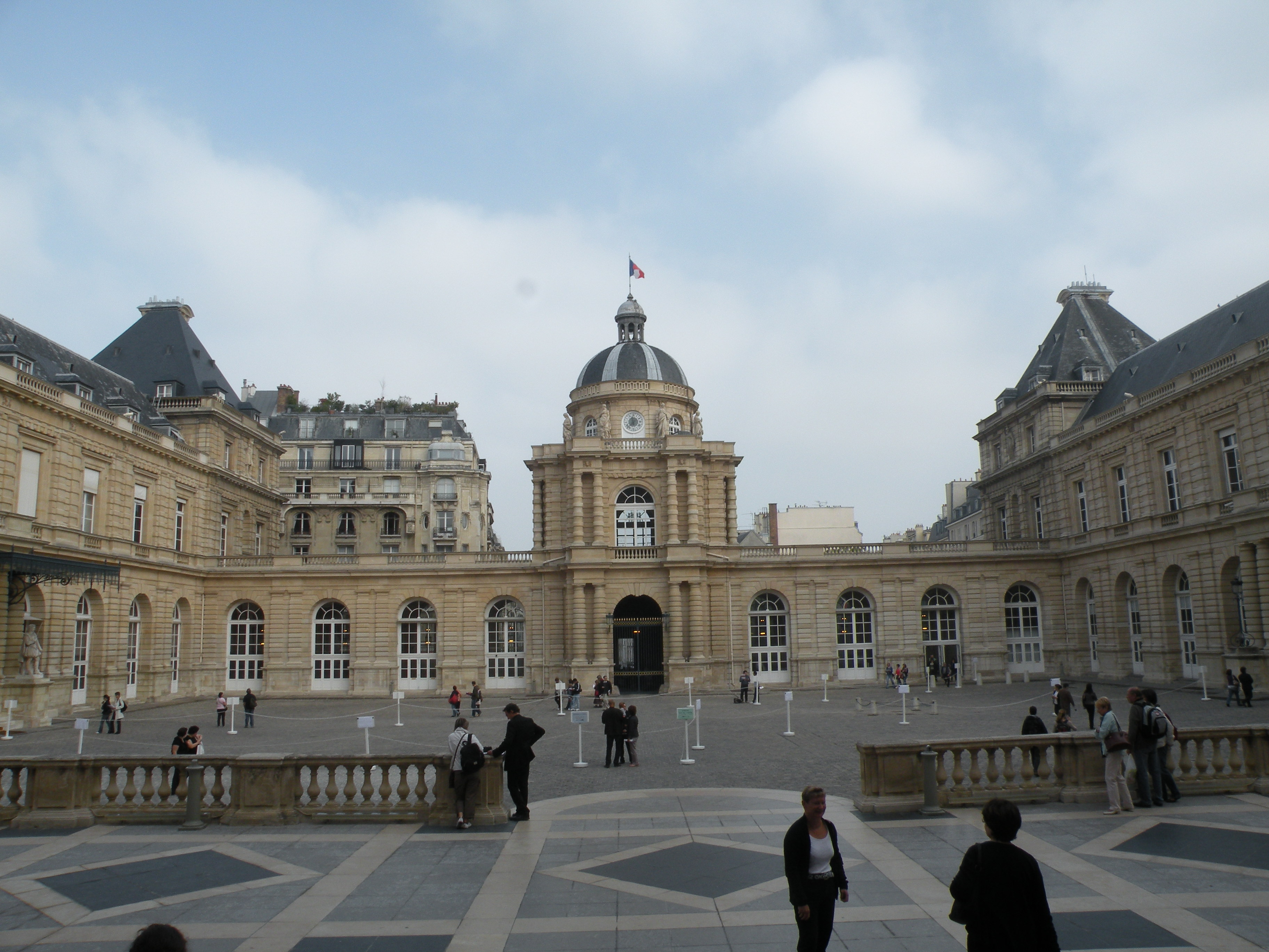 cour d'honneur en direction du dome palais du luxembourg